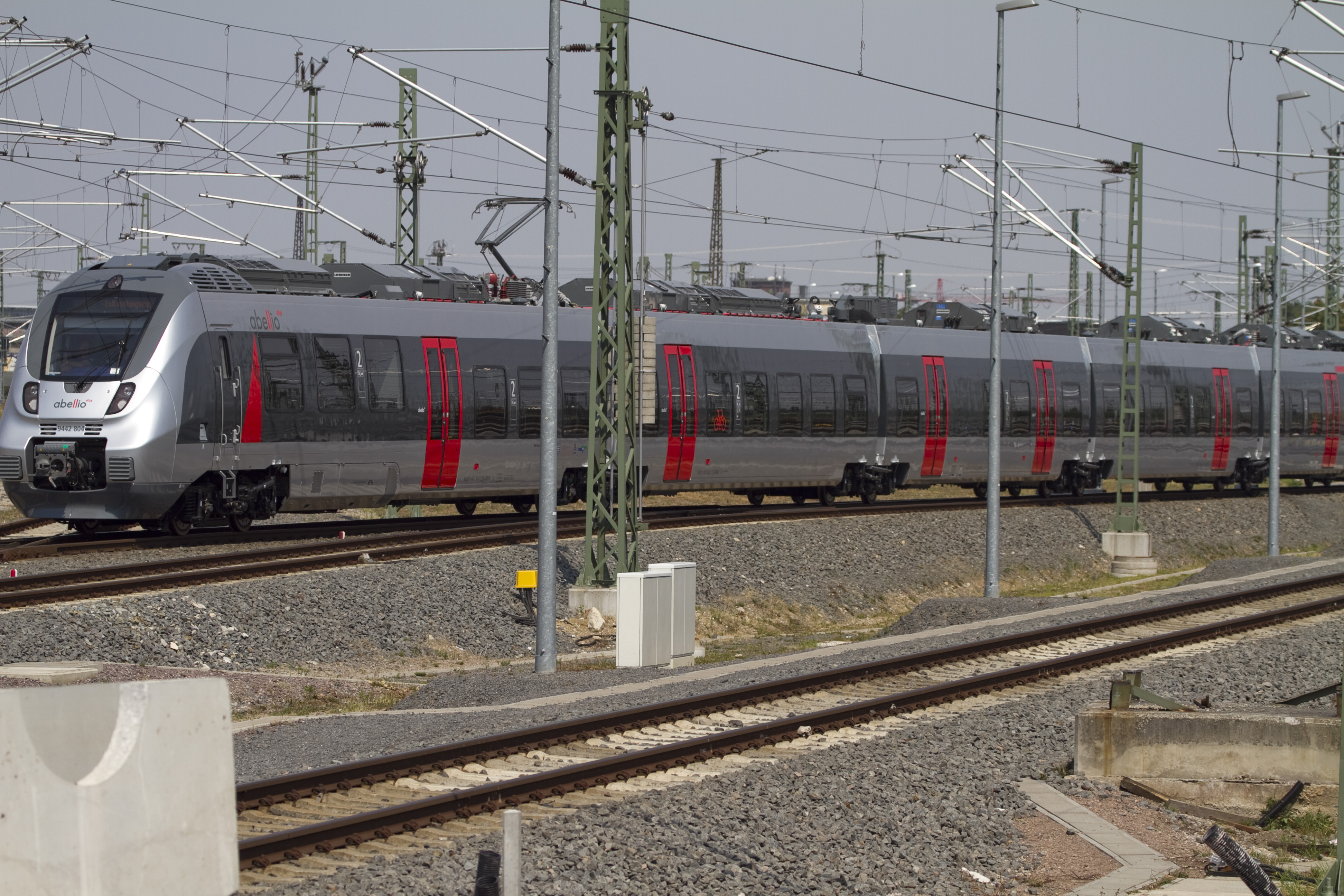 Probefahrten der abellio für das Saale-Thüringen-Südharz-Netz im Leipziger Hauptbahnhof